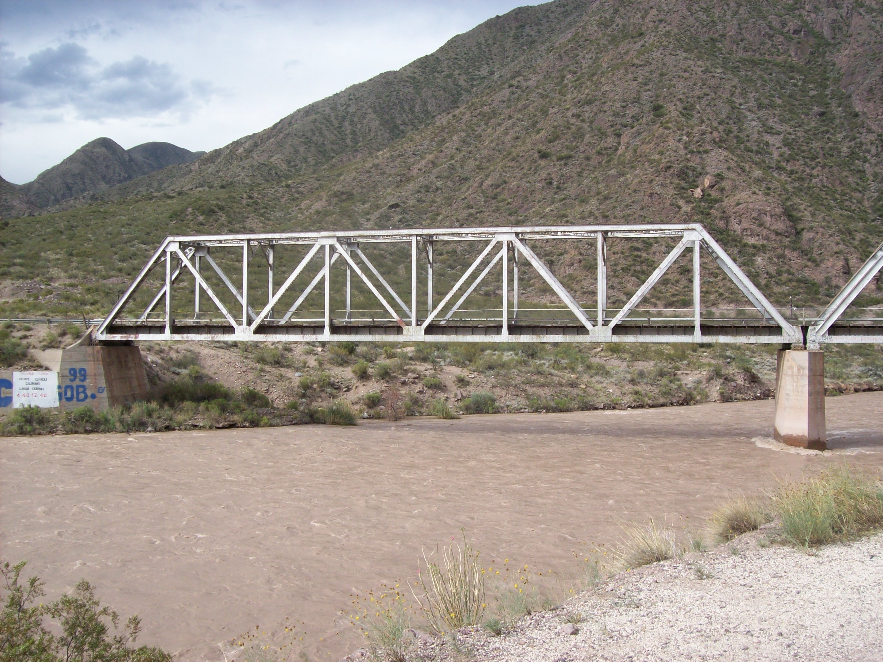 Puente del ex-Ferrocarril Trasandino sobre el Río Mendoza, en la Provincia de Mendoza, Argentina. Actualmente sirve como puente vehicular para el acceso de los terrenos circundantes. Este puente se encuentra en el km 1101 de la Ruta Nacional 7.